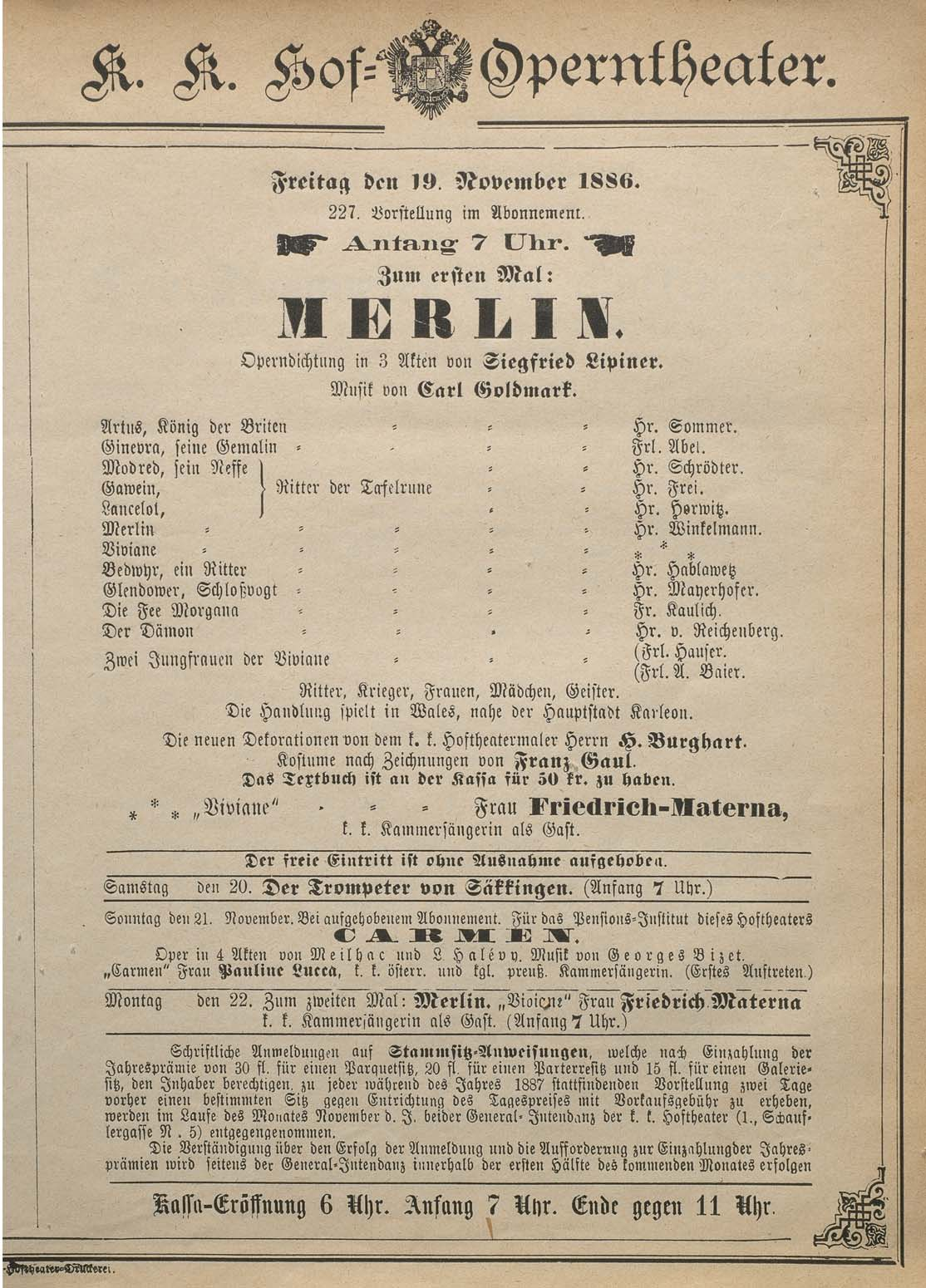 Programmheft Oper Merlin (Goldmark) Uraufführung 1886 Template:Vorlage:Bild-PD-Schöpfungshöhe